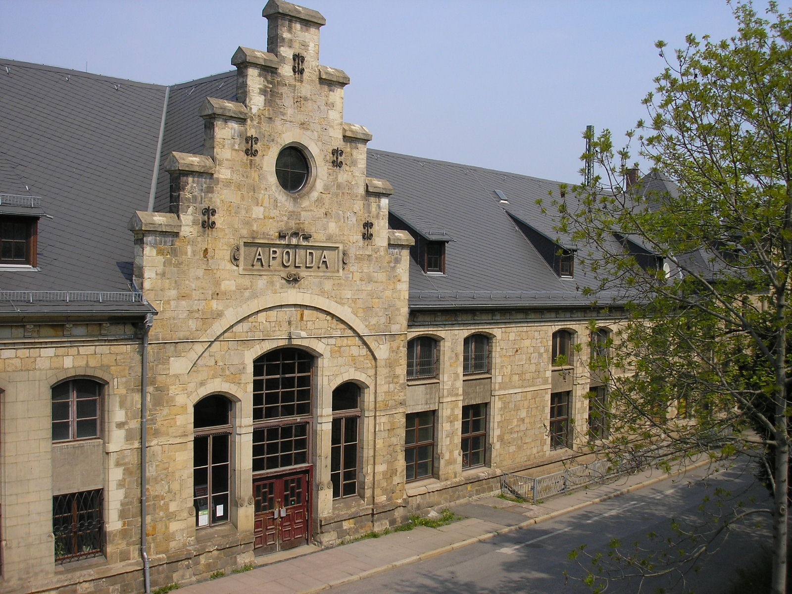 Bahnhof der Stadt Apolda (Thüringen).